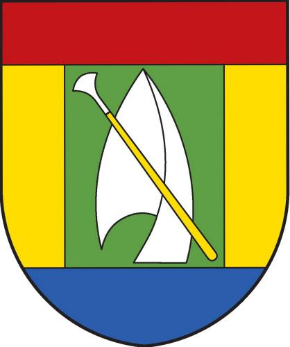 Chrudichromy znak